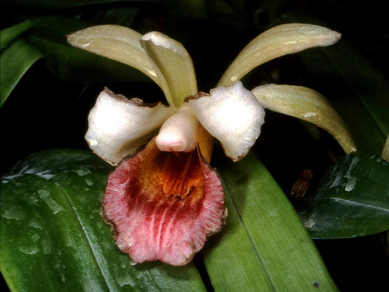 Chondrorhyncha hirtzii